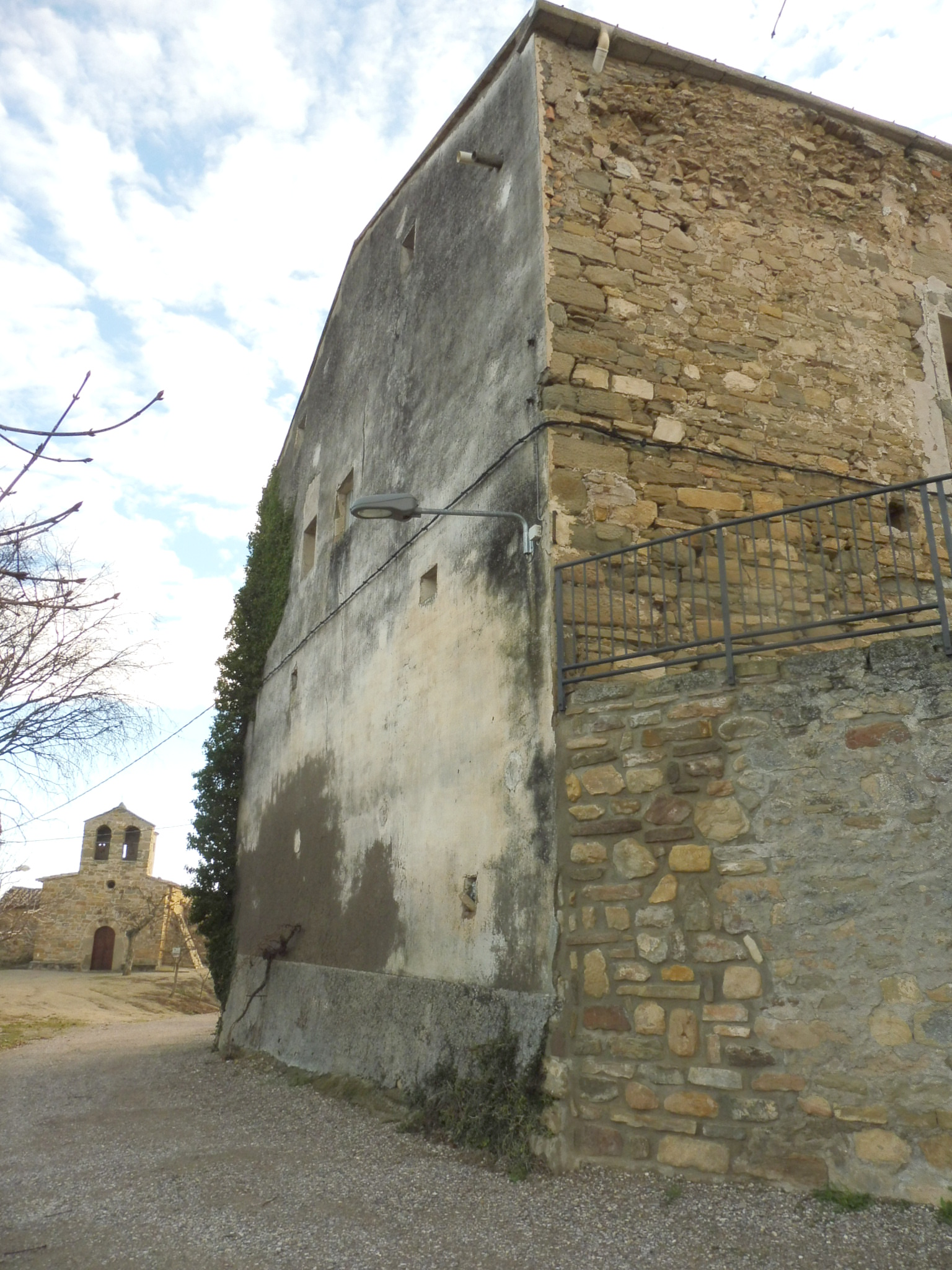 El Castellot de Marcovau (Foradada), amb l'església de Sant Salvador al fons